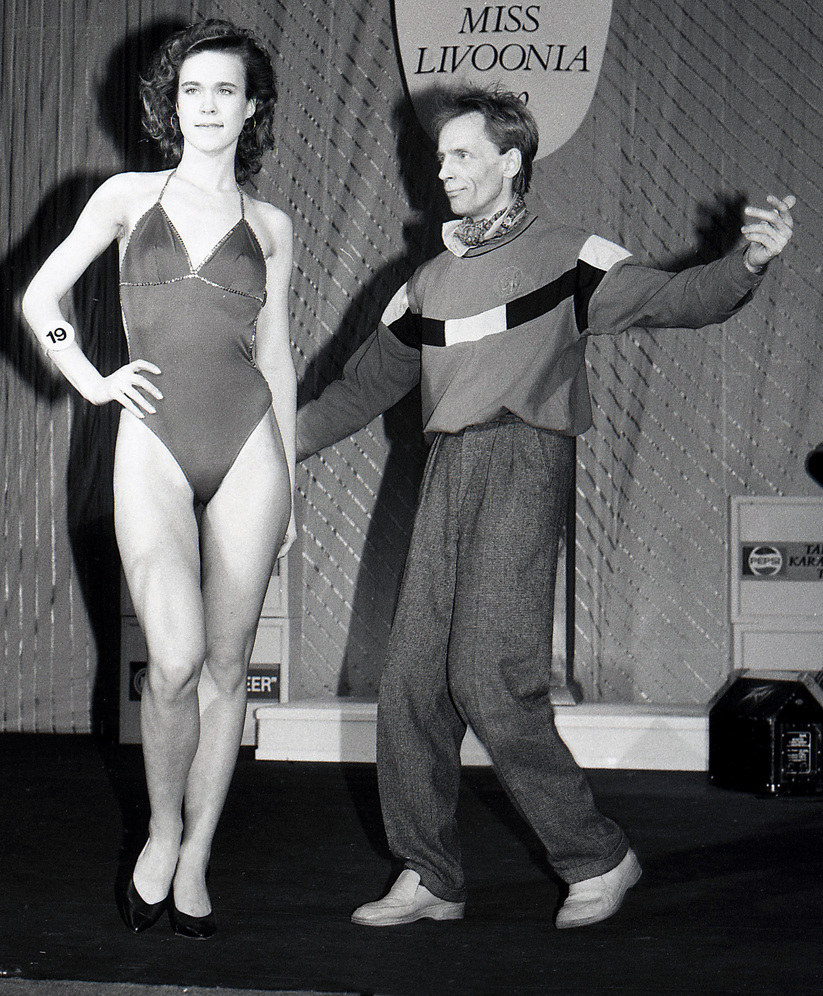 Mait Agu õpetab missidele kõndimist 1990